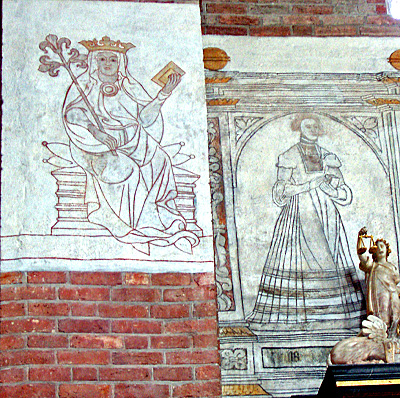 Kalkmaleri i St. Bendts Kirke , Ringsted, Denmark